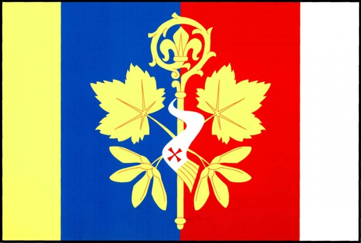 vlajka, Klenovice, okres Tábor